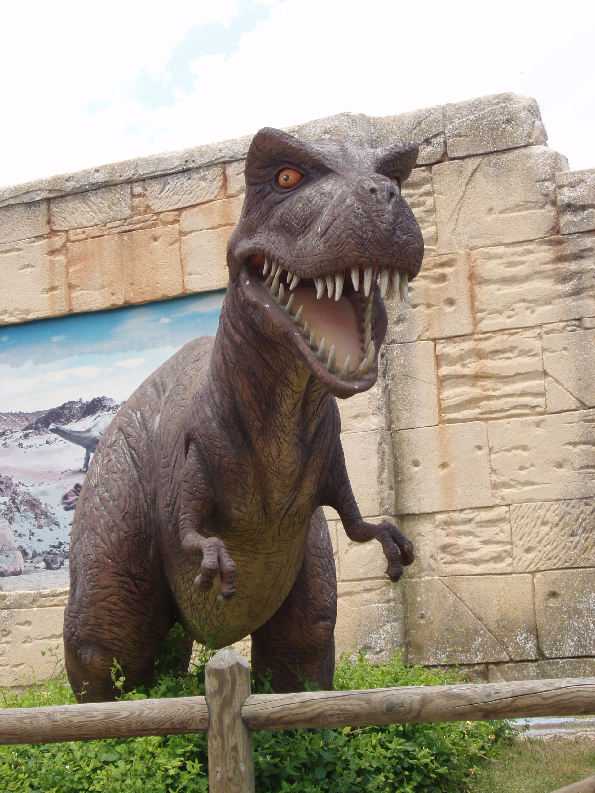 Dinópolis, dinosaurio